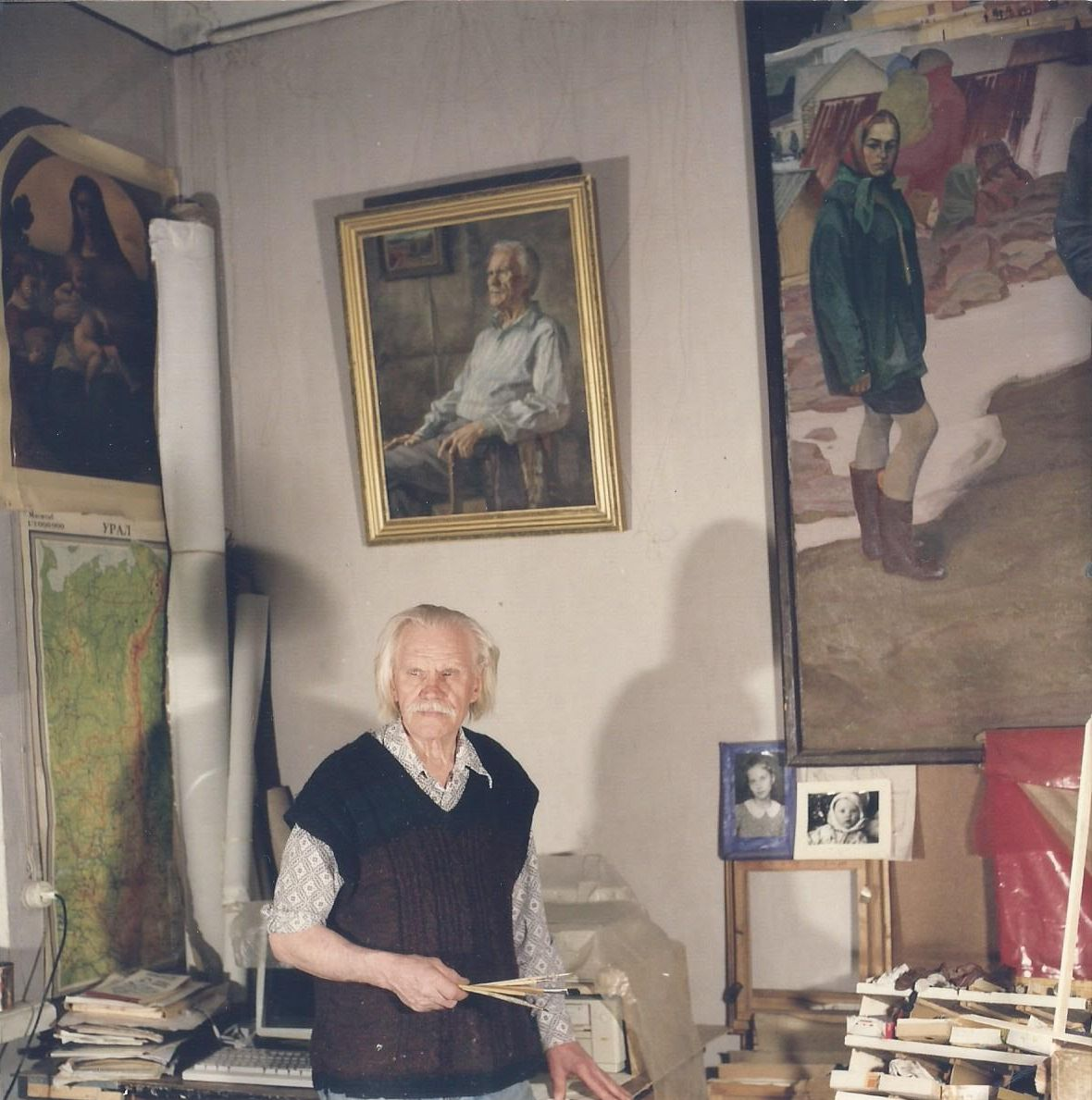 В мастерской на ул. Куйбышева, 1998г.